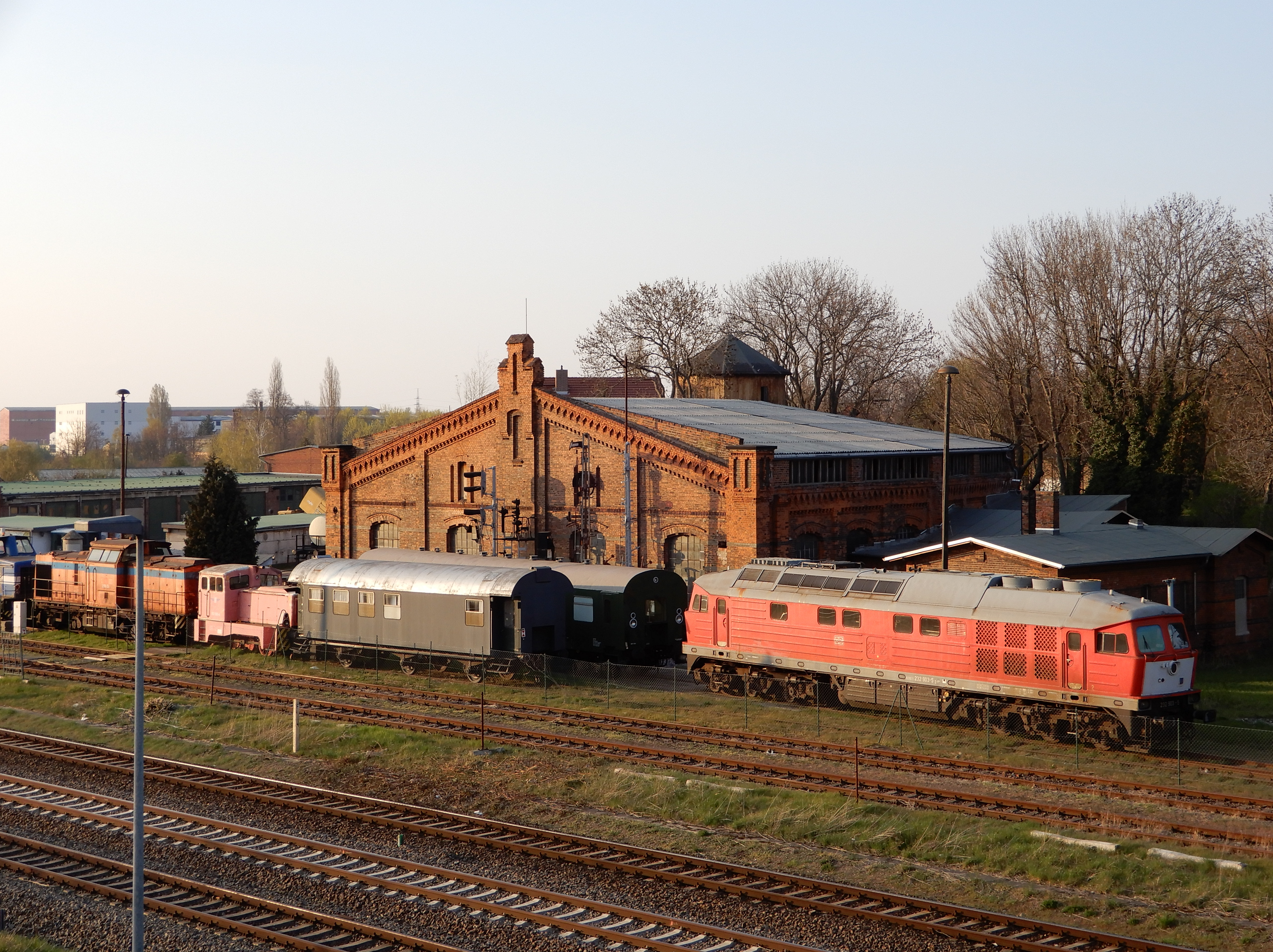 Bahnbetriebswerk an der Magdeburger Chaussee in Aschersleben